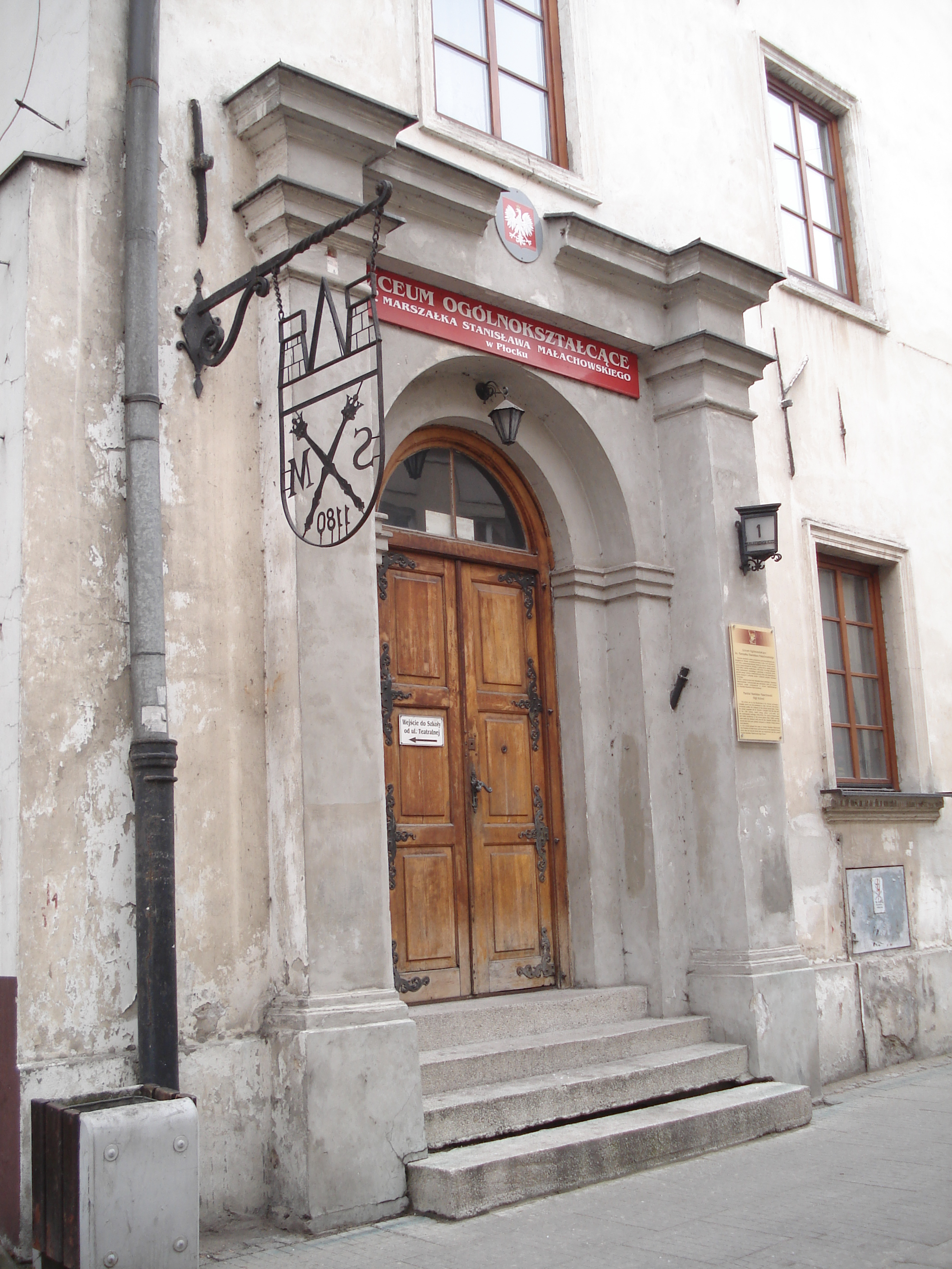 Dawne wejście do Liceum Ogólnokształcącego im. Marszałka Stanisława Małachowskiego w Płocku w najstarszej części szkoły (z 1180 roku).